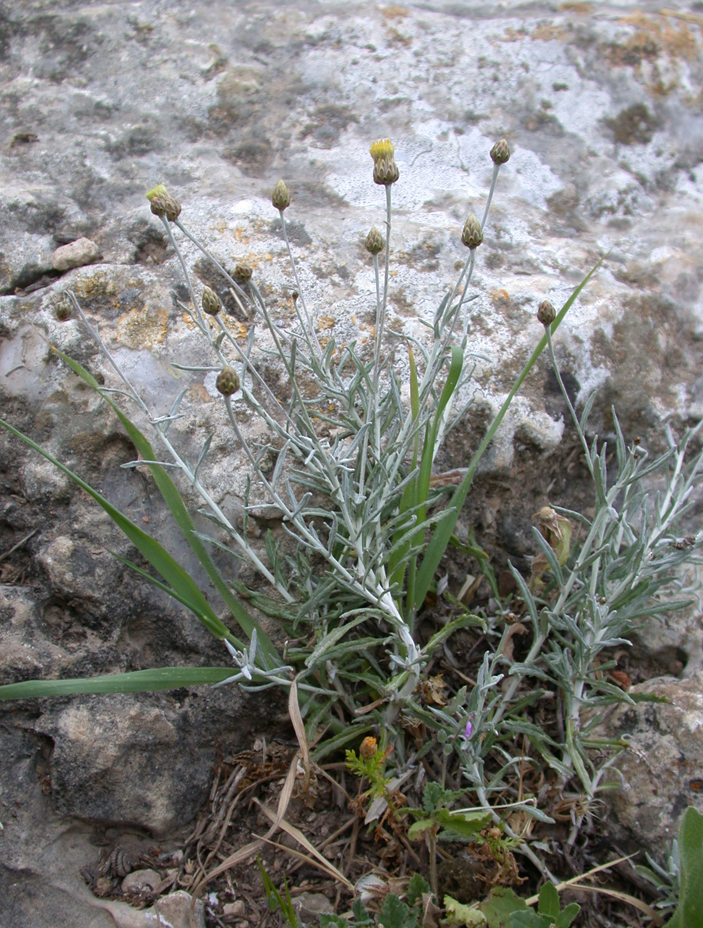 Phagnalon rupestre (L.) DC. (צמרנית הסלעים), Mount Carmel, Israel, April 4, 2008.